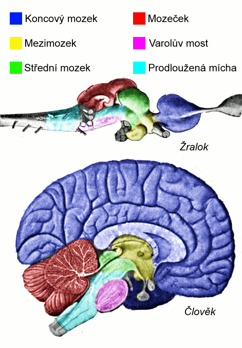 Hlavní oblasti mozku obratlovců, znázorněné na žraločím a lidském mozku. Tyto dva mozky nejsou ve stejném měřítku.